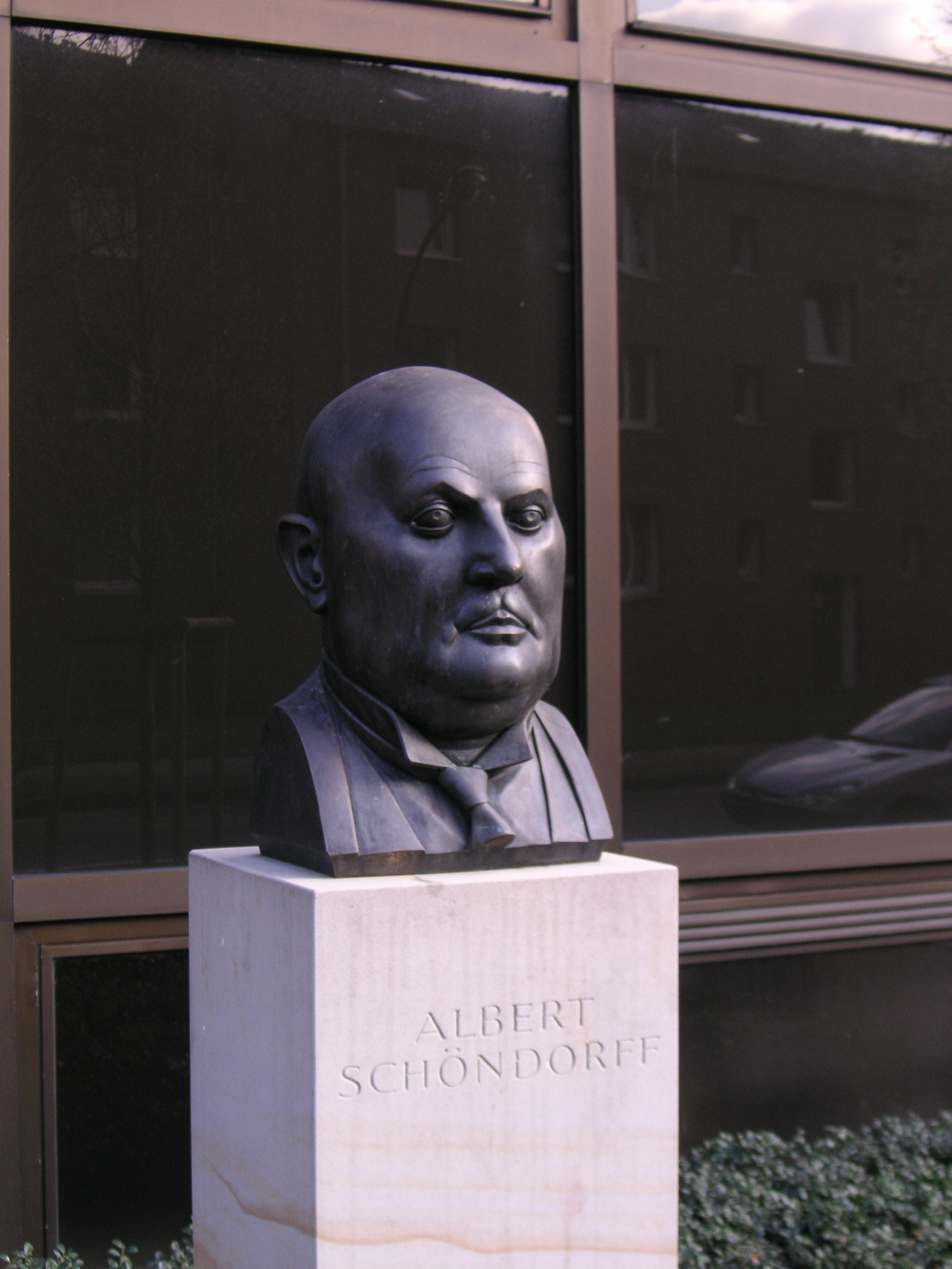 Büste von Albert Schöndorff, Düsseldorfer Unternehmer und NS-Opfer